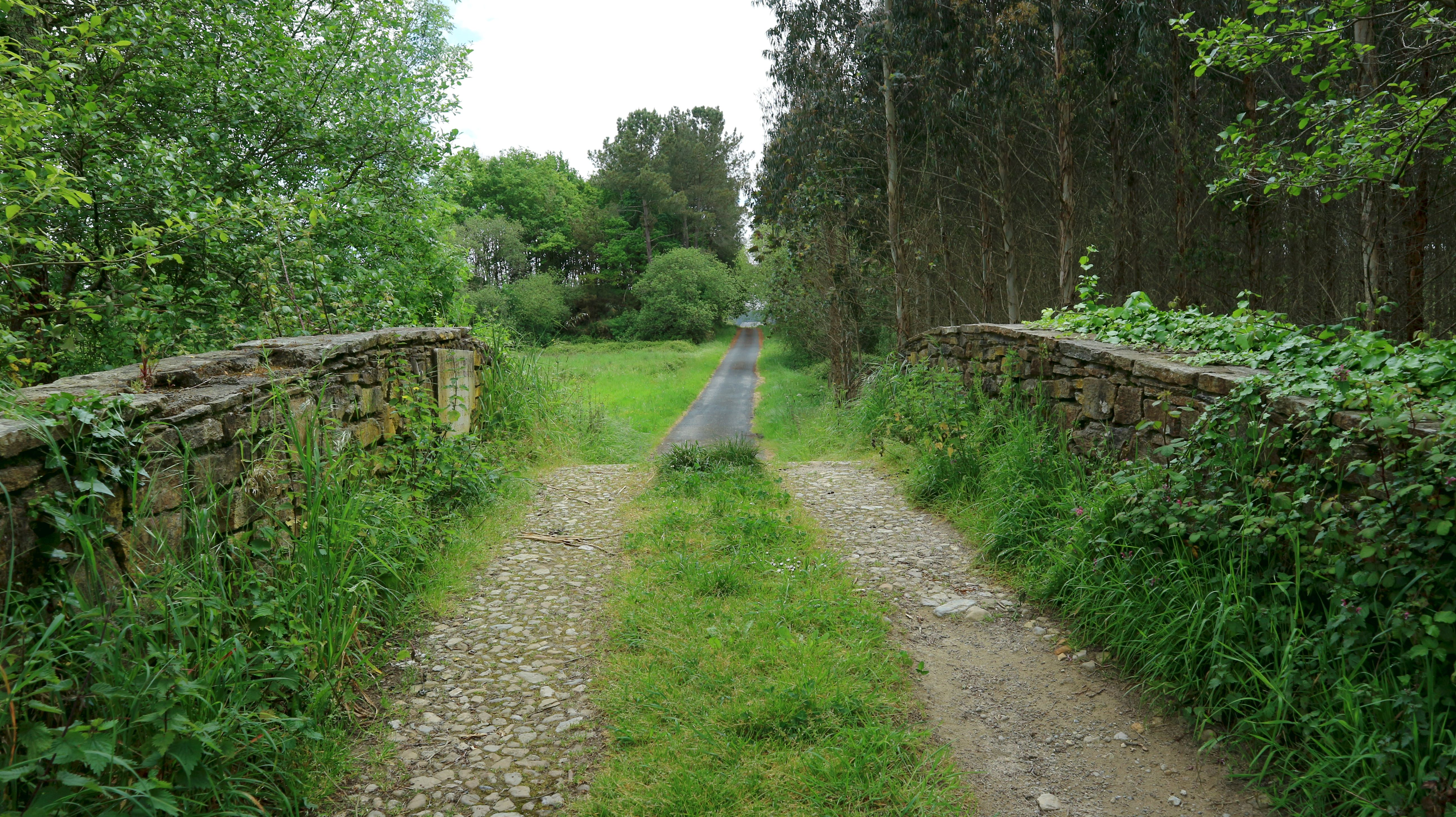 Ponte de Beldoña, que dá o paso de Beldoña (Mabegondo) a Guiliade (Piadela, Betanzos).